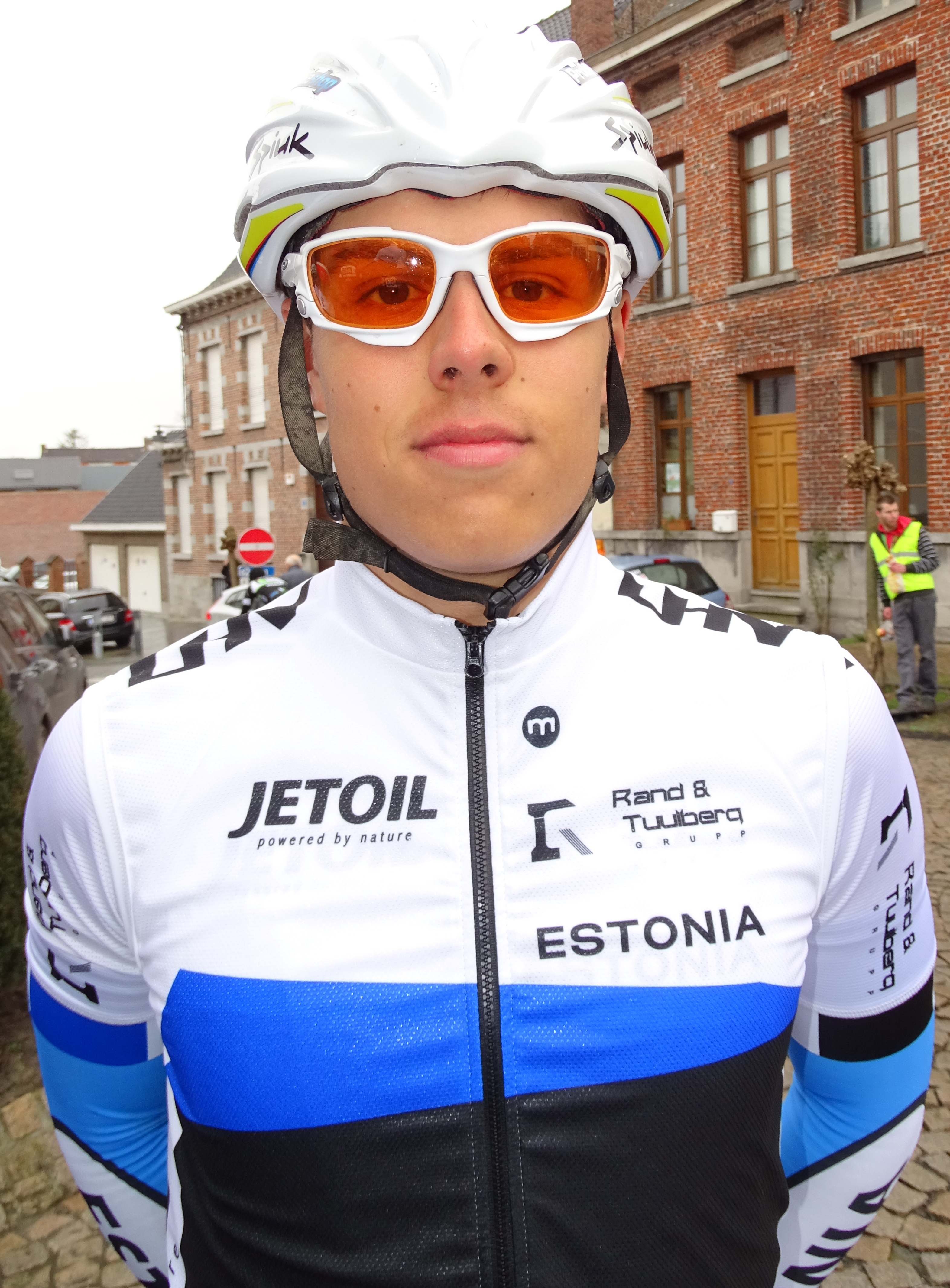 Triptyque des Monts et Châteaux 2015 Depicted person: Aksel Nõmmela – cyclist Depicted team: Équipe nationale d'Estonie espoirs